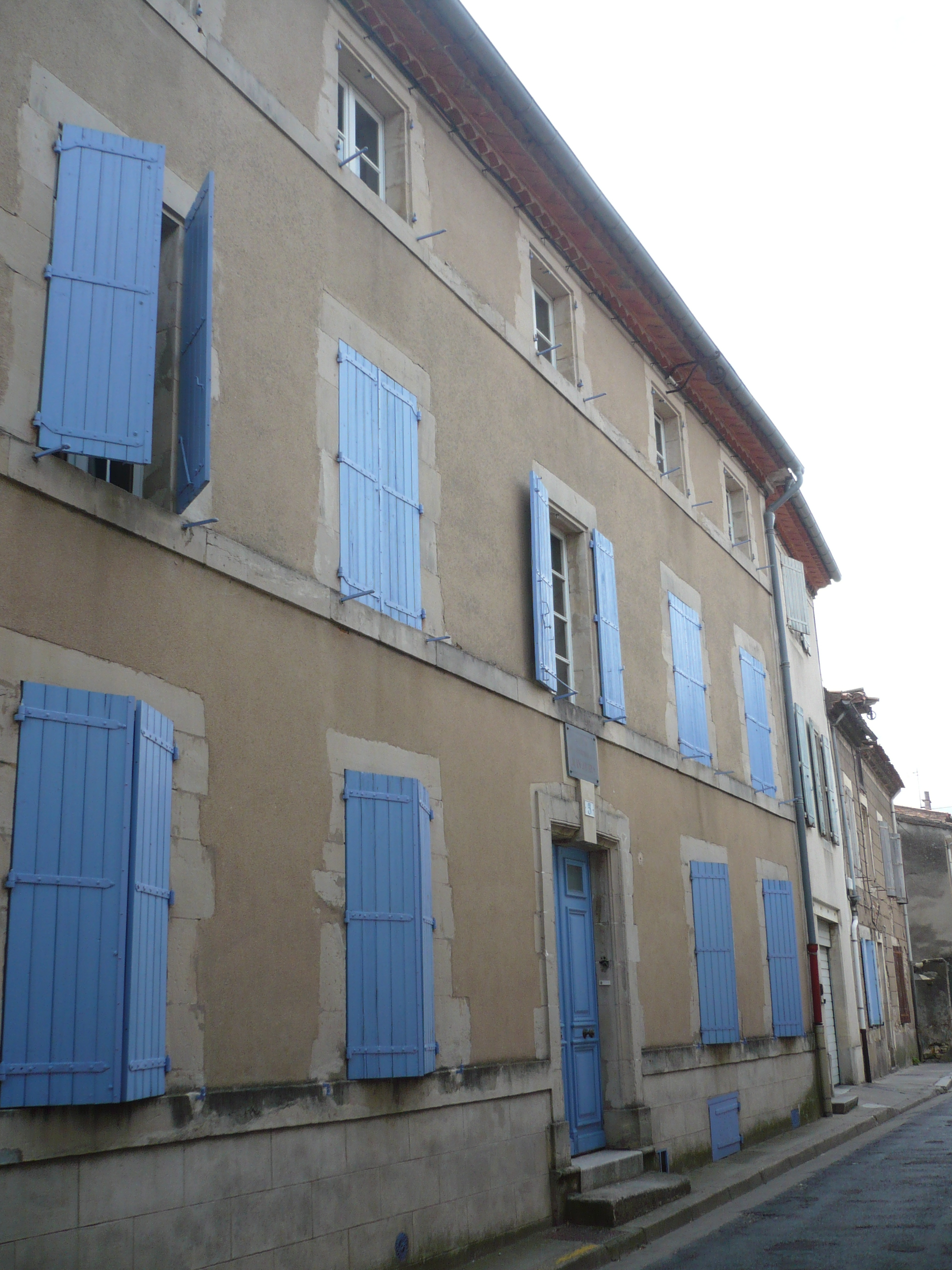 Maison, rue Réclusane, où naquit Jean Jaurès le 3 septembre 1859 à Castres dans le département français du Tarn.